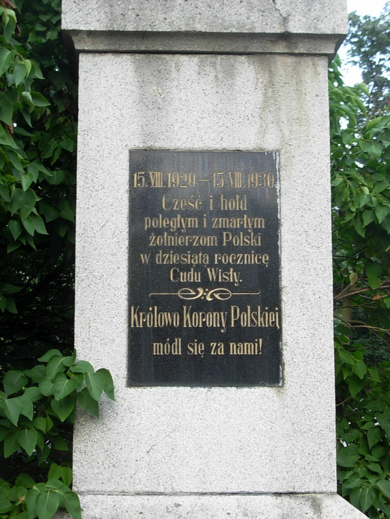 Cmentarz Nowofarny Bydgoszcz, tablica na pomniku NMP Królowej Korony Polskiej